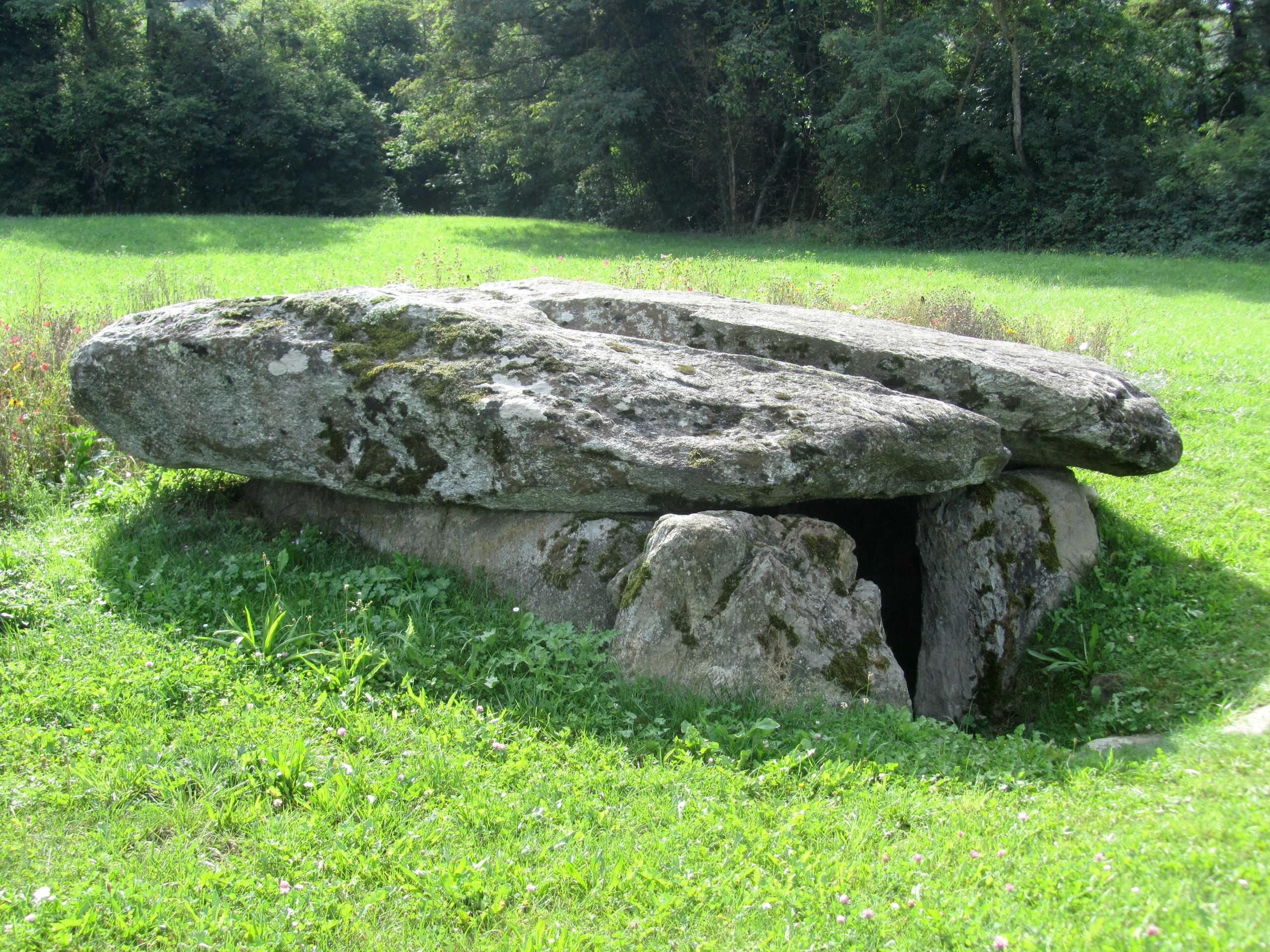 Dolmen de Saint-Cergues (Haute-Savoie), dit La Cave ou Chambre aux Fées